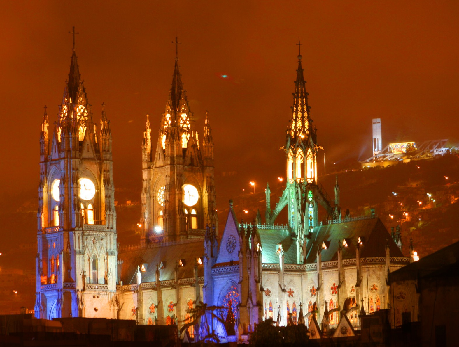 Basílica del voto nacional en la noche